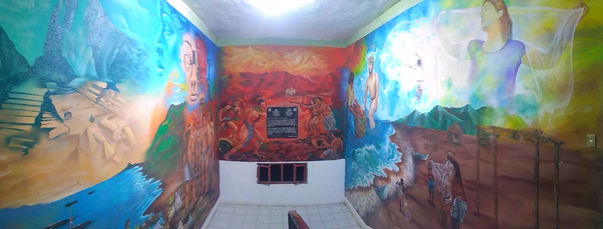 Pintura de las escaleras del palacio municipal